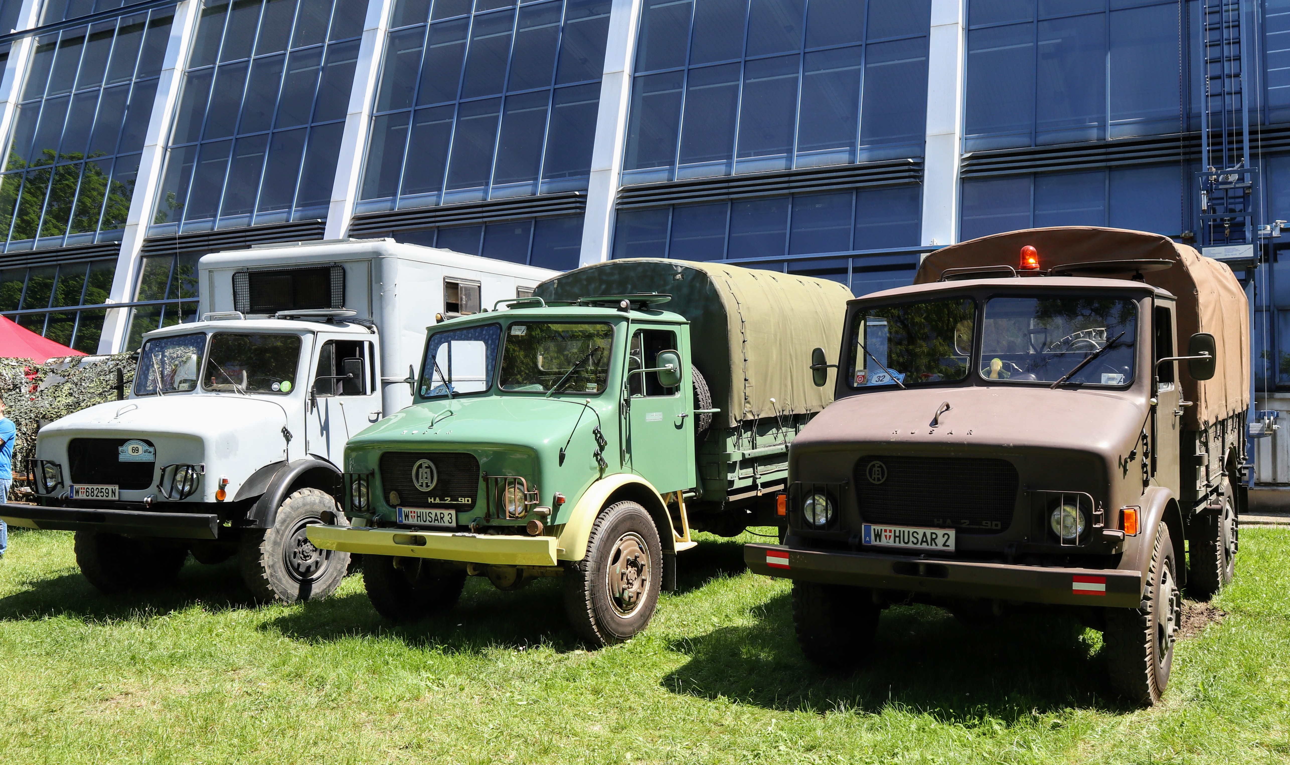 ÖAF Husar Fahrzeuge bei "Auf Rädern und Ketten" 2019 Wien